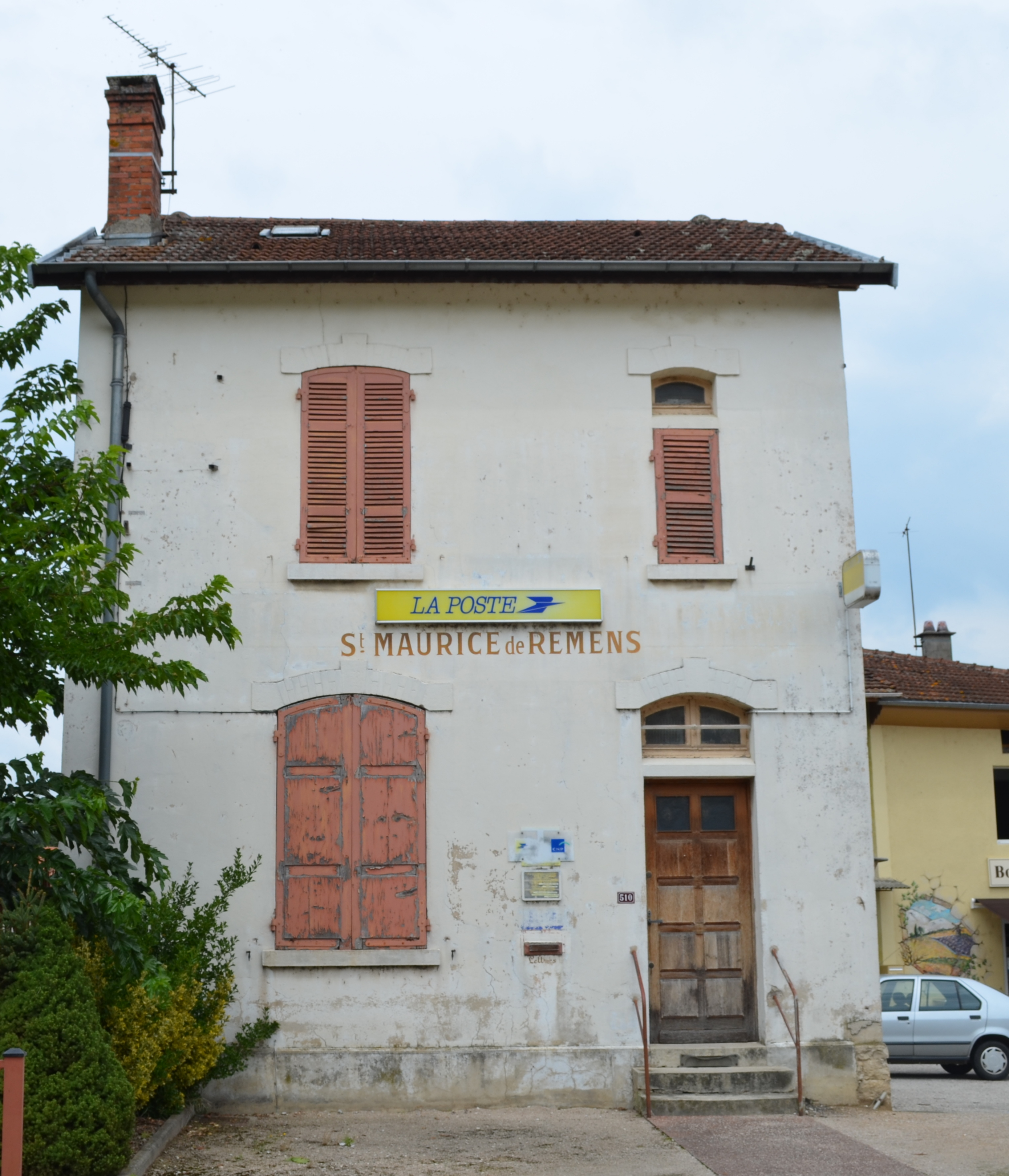 La poste de Saint-Maurice-de-Rémens.